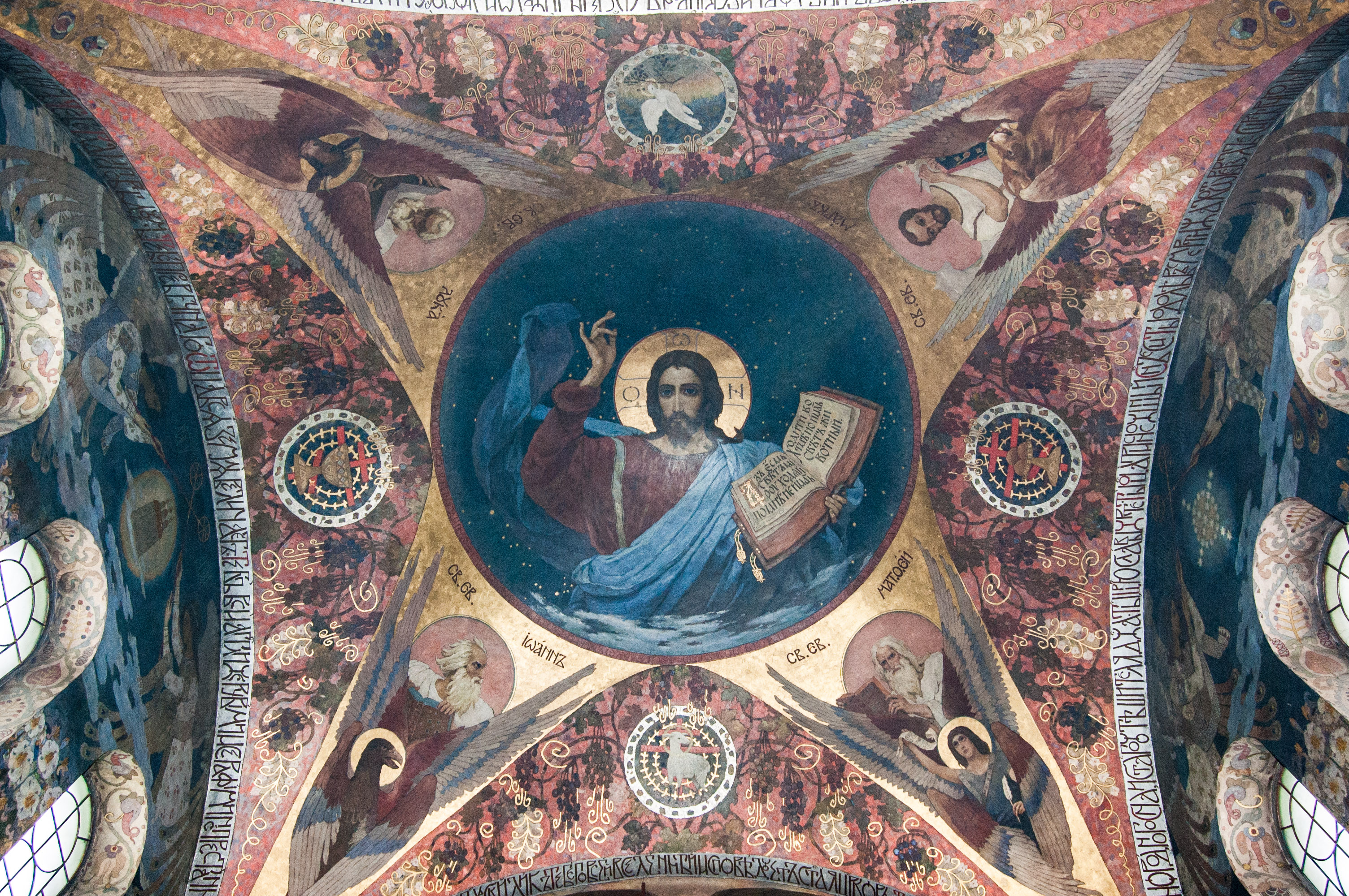 Комплекс пам'яток на історичному місці полі Полтавської битви «Поле Полтавської битви», Полтава, північно-західна околиця